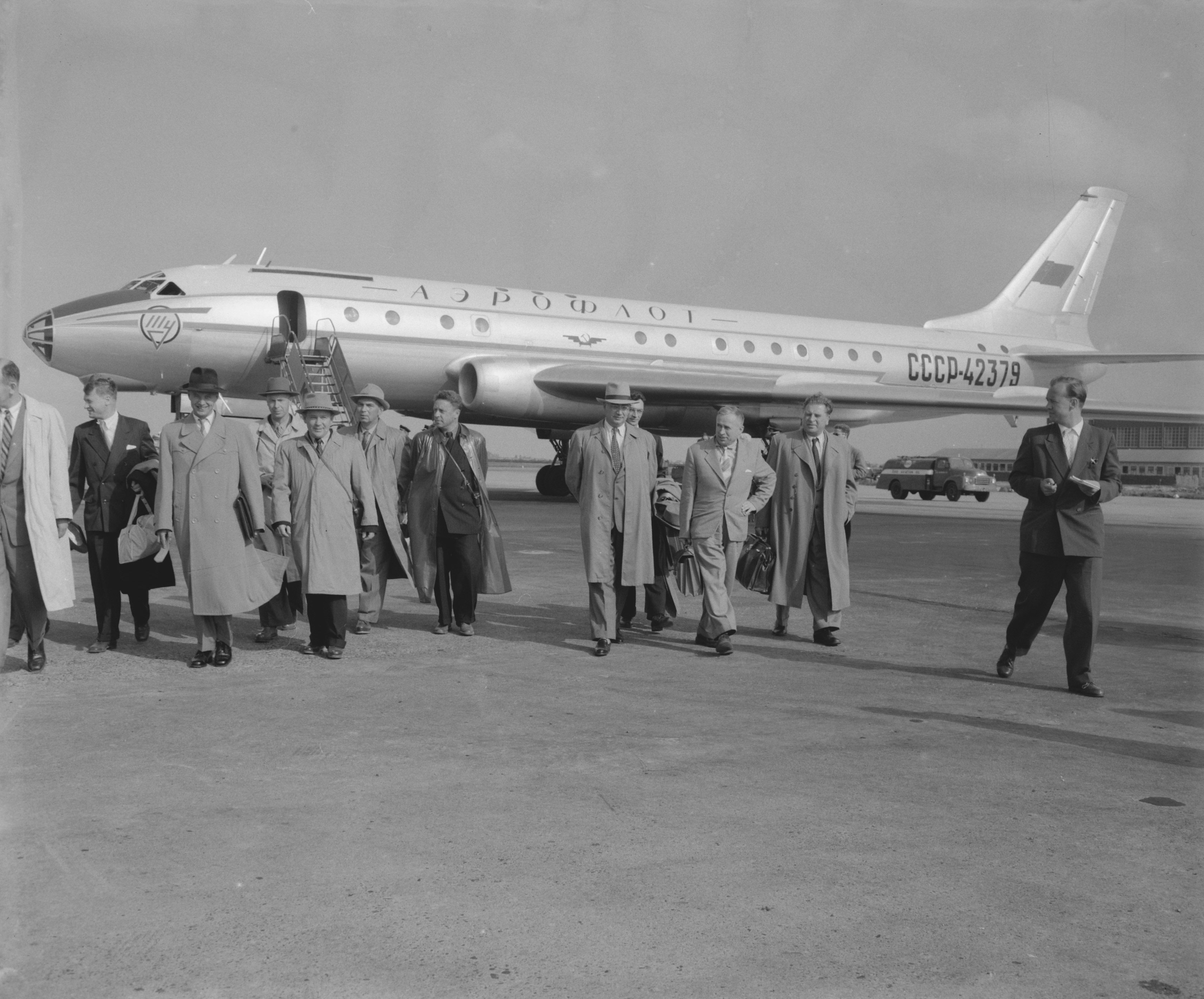 Collectie / Archief : Fotocollectie Anefo Reportage / Serie : [ onbekend ] Beschrijving : Russische delegatie voor Ruimtevaartcongres op Schiphol Datum : 23 augustus 1958 Locatie : Noord-Holland, Schiphol Trefwoorden : Ruimtevaartcongressen, delegaties Fotograaf : Behrens, Herbert / Anefo Auteursrechthebbende : Nationaal Archief Materiaalsoort : Negatief (zwart/wit) Nummer archiefinventaris : bekijk toegang 2.24.01.04 Bestanddeelnummer : 909-7951